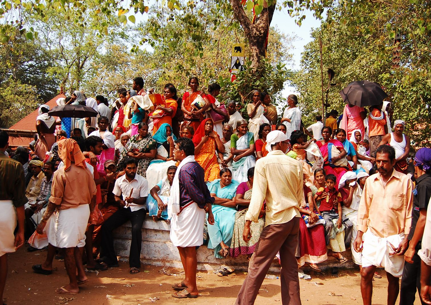 വടക്കൻ ജില്ലകളിൽ നിന്നു വന്ന തീർത്ഥാടകർ അവരുടെ അവകാശത്തറയിൽ സ്ഥാനം പിടിച്ചിരിക്കുന്നു